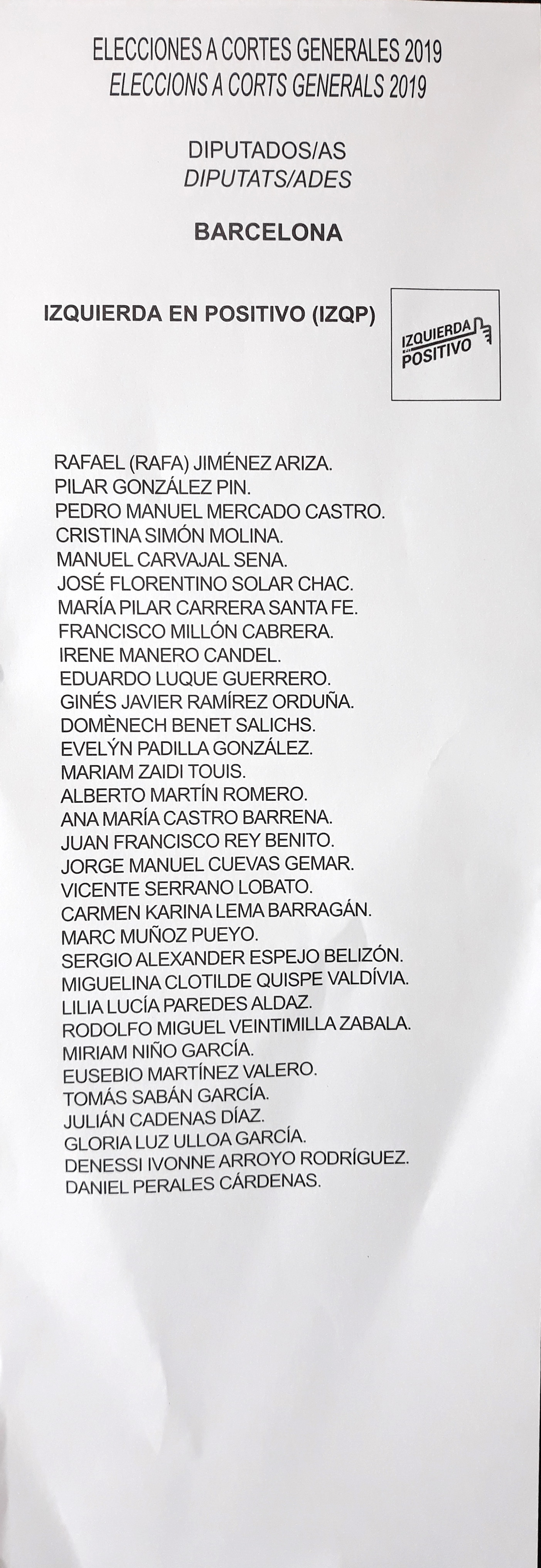 Papereta eleccions generals espanyoles - Barcelona - Izquierda en Positivo (IZQP)